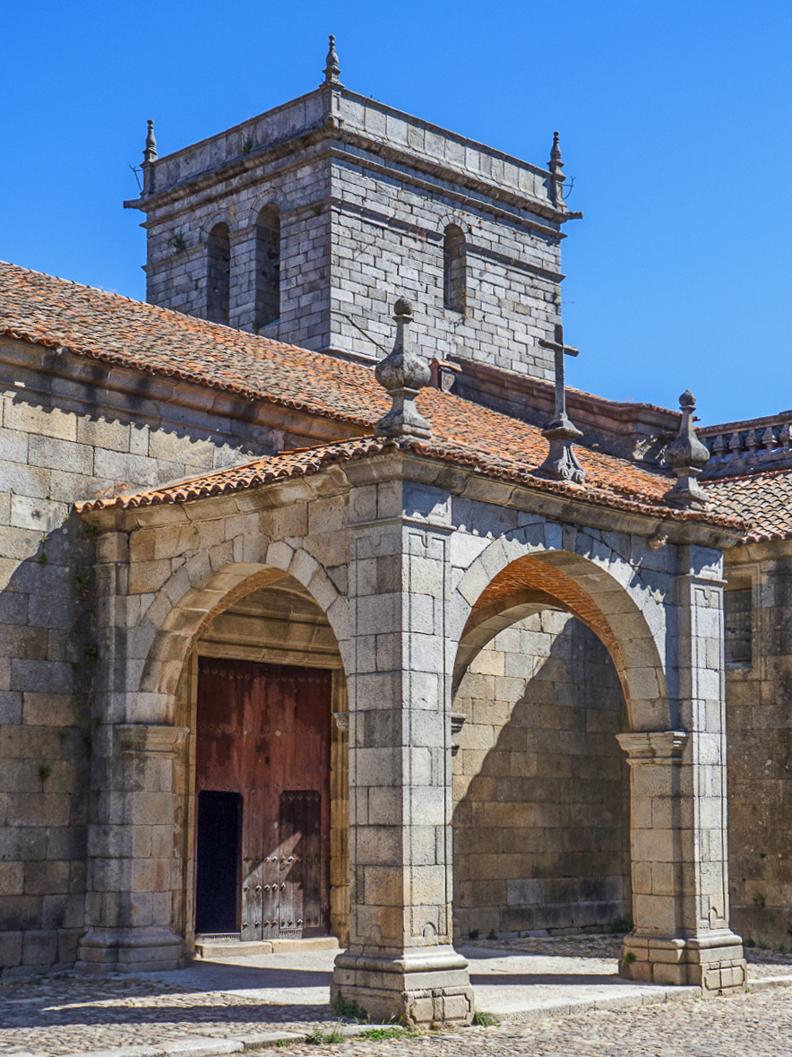 03082013 112728 ALBERCA 0094